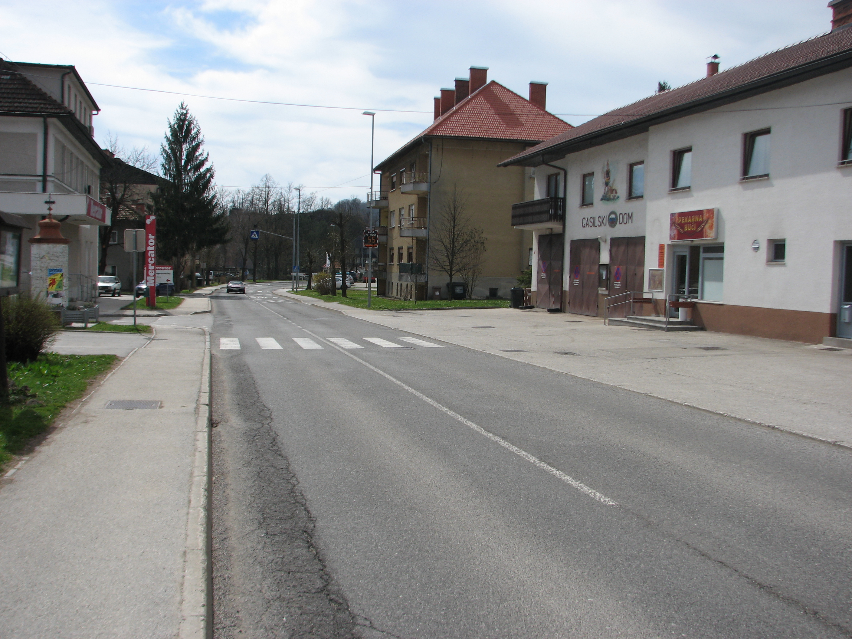 Titova cesta s pogledom na Gasilski dom.